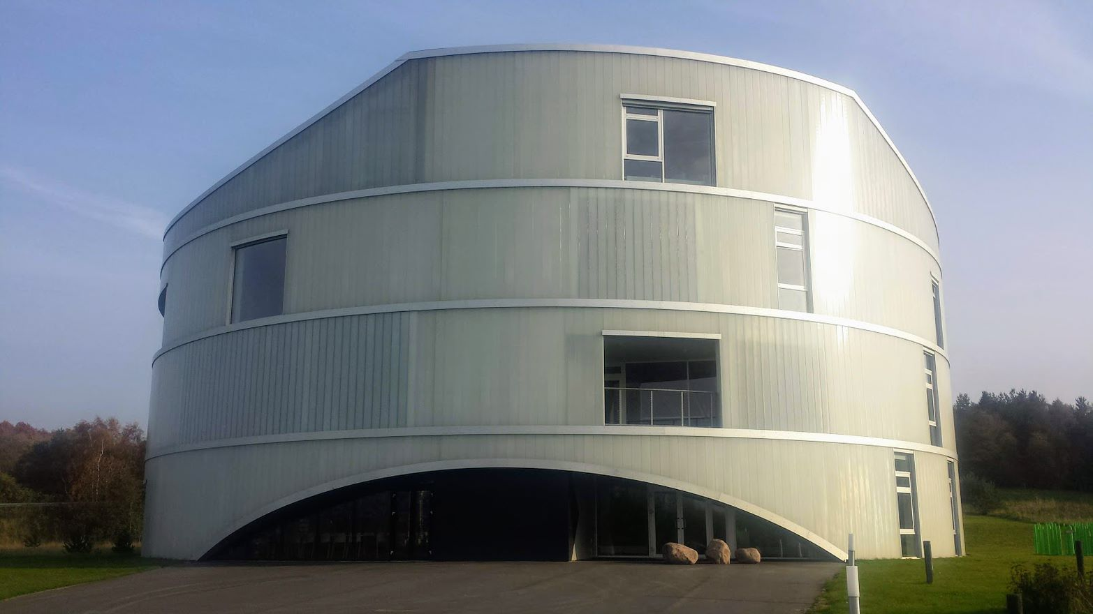 Naturvidenskabernes Hus, i Bjerringbro